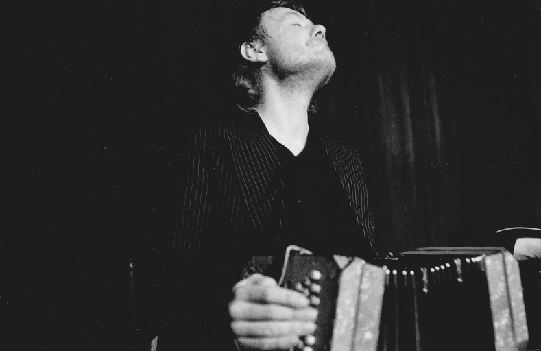 Leipziger Liederszene: Jürgen B. Wolff mit Konzertina; Foto: Szenefotograf Jochen Janus